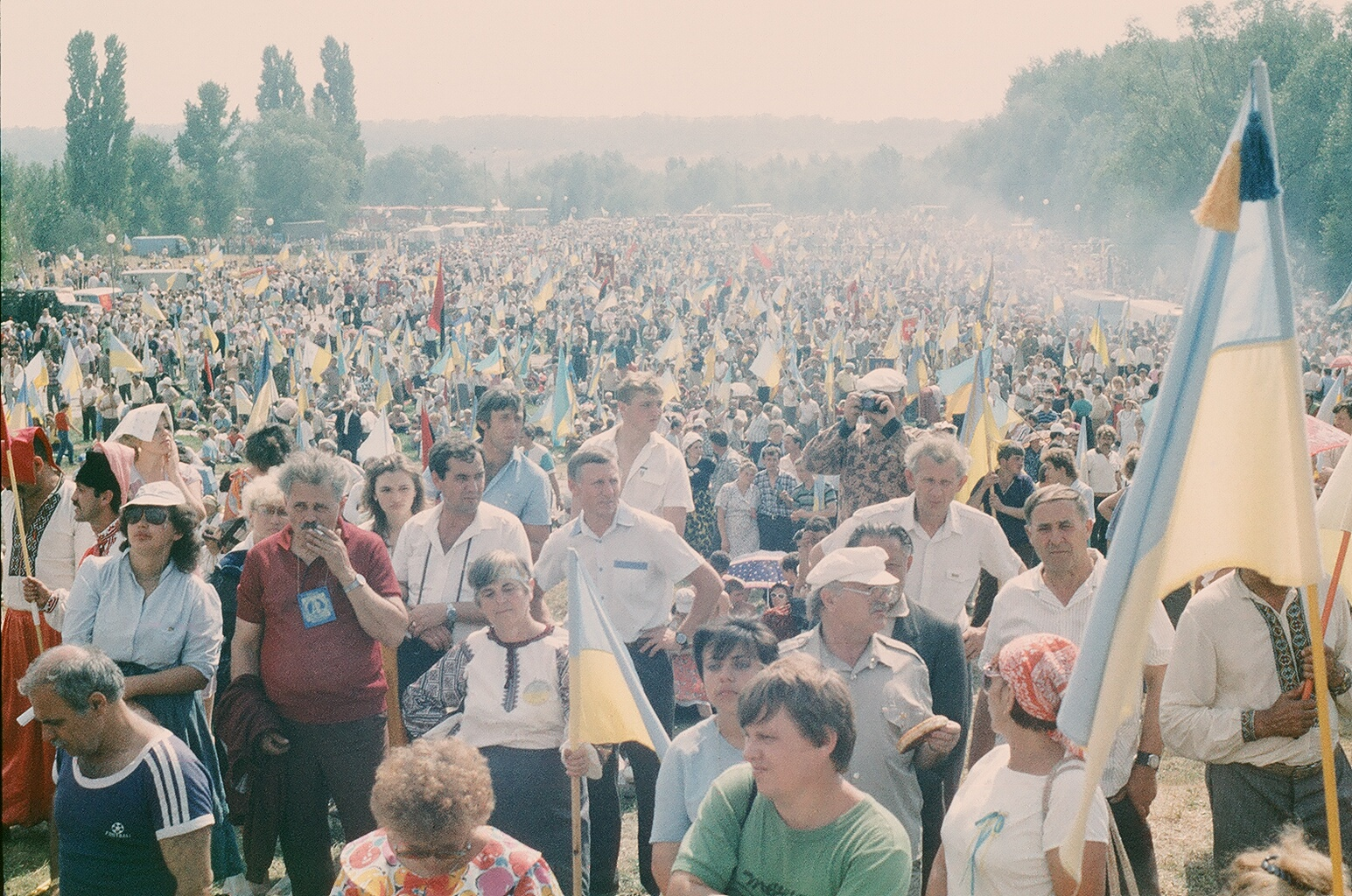 Мітинг у Запоріжжі: Фото